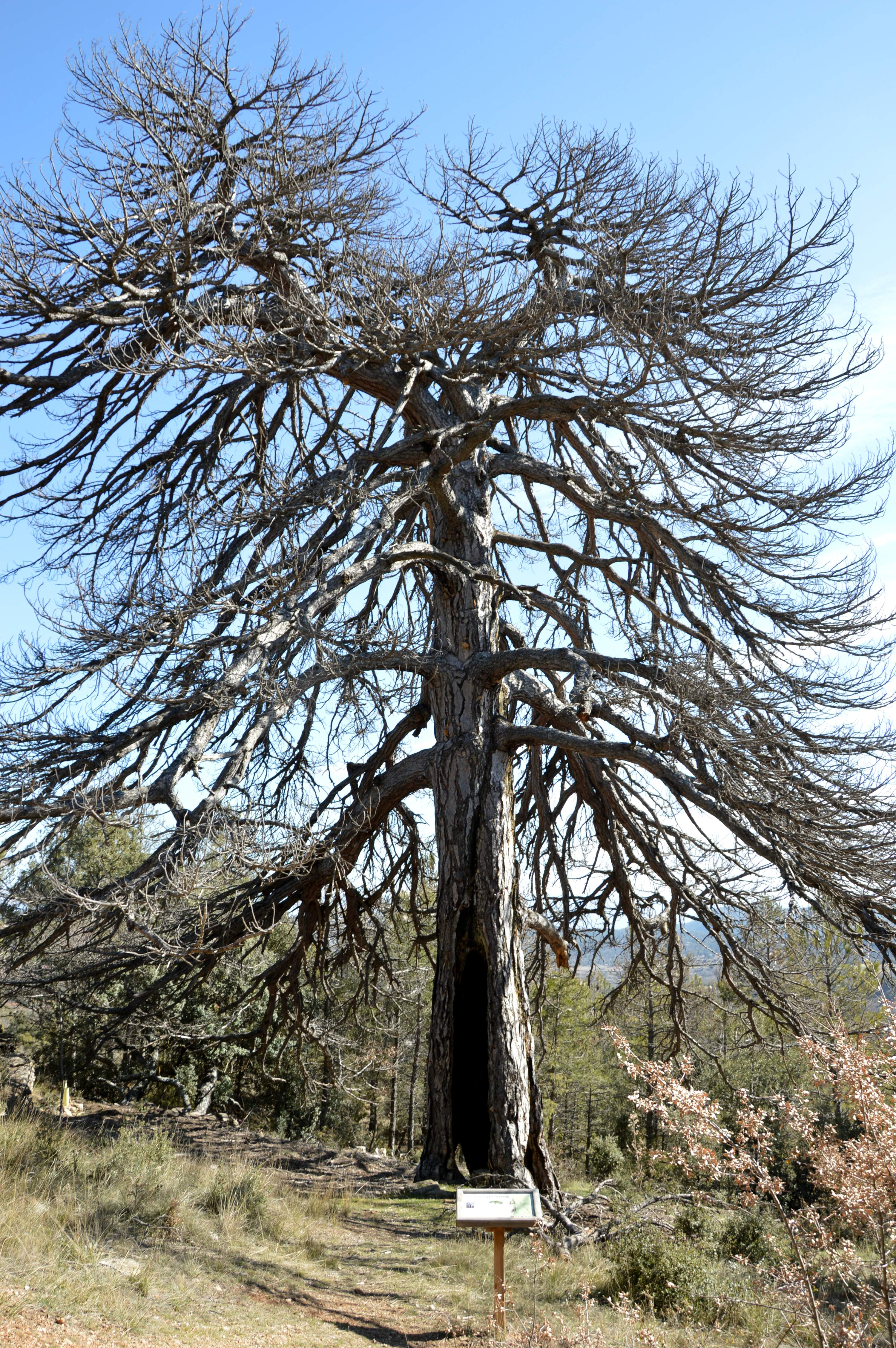 Vista general del Pino Ramudo, monumental pino laricio (Pinus nigra), ya muerto en Alobras (Teruel), 2017.